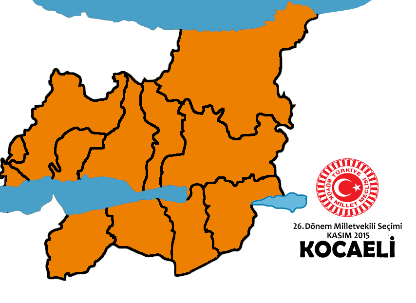 Kasım 2015 Seçimleri